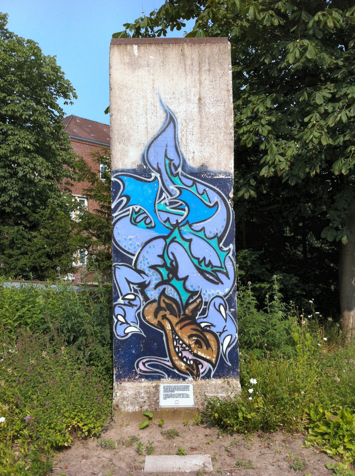 Teil der Berliner Mauer in Kiel, Schleswig-Holstein, Germany